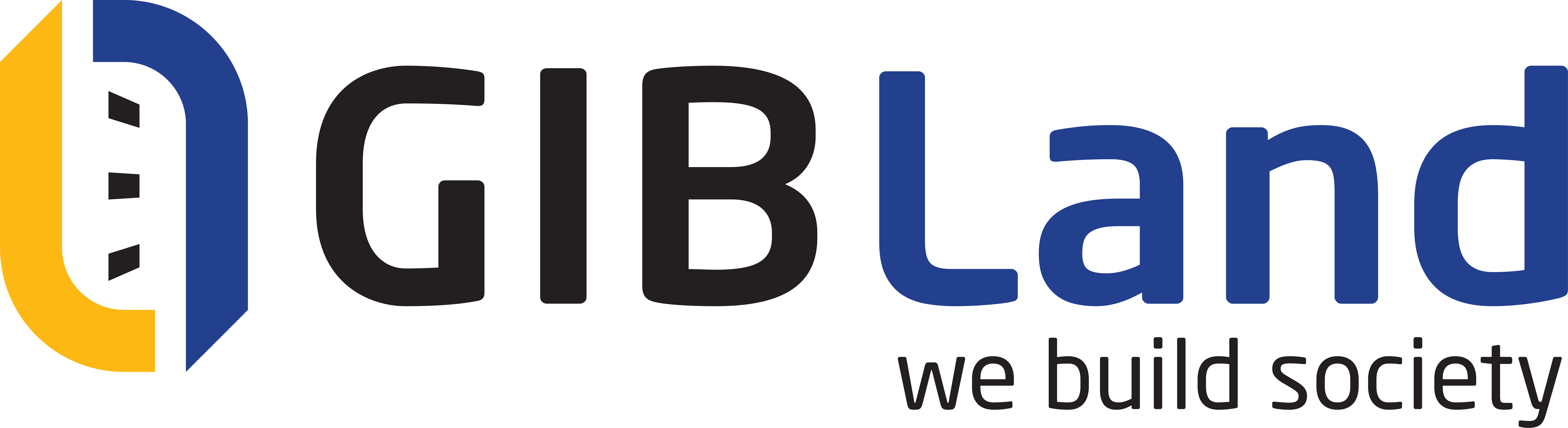 Logo GIB Land